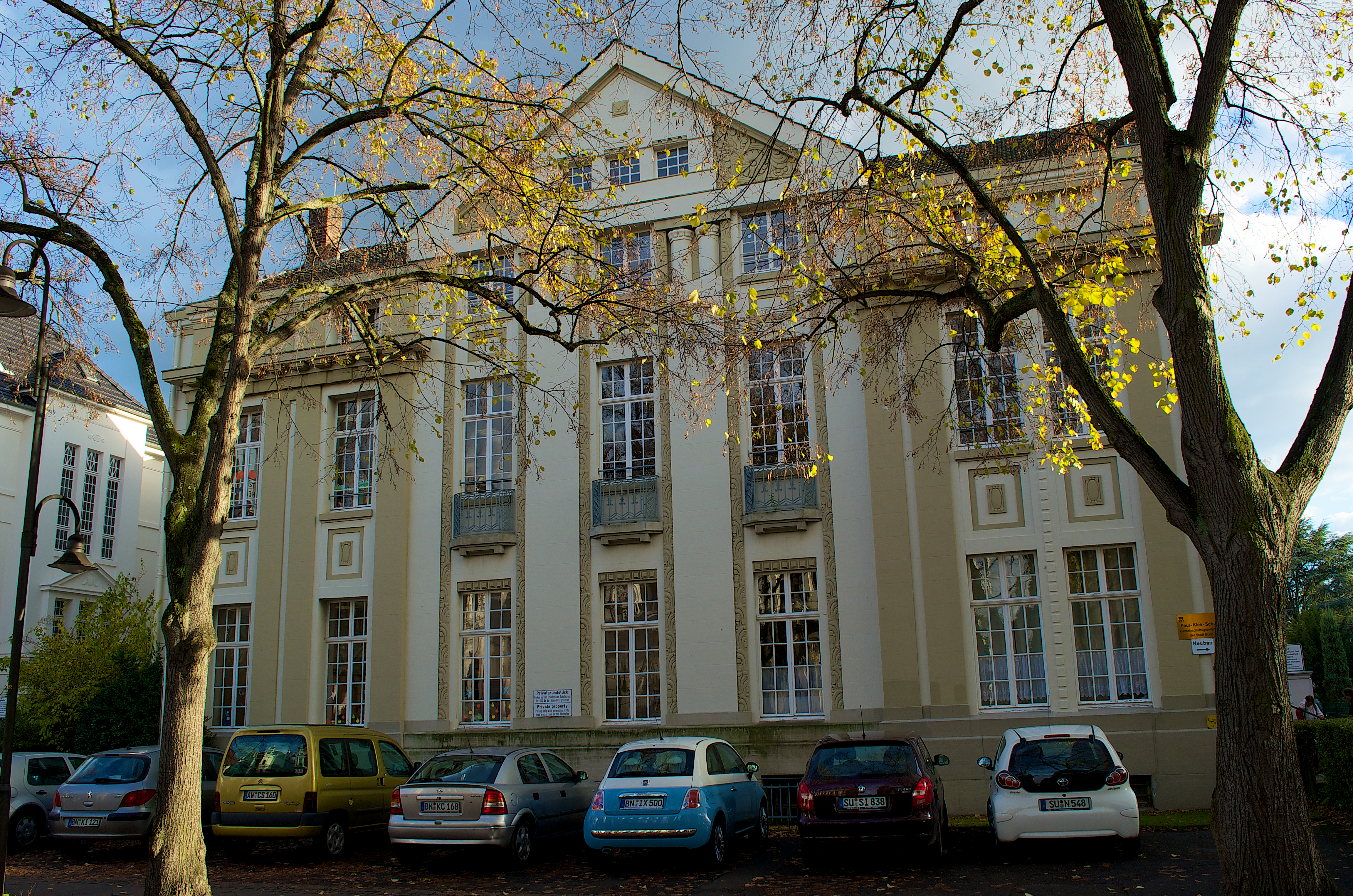 Denkmalgeschütztes Schulgebäude Rheinallee 26 in Bad Godesberg, Ortsteil Godesberg-Villenviertel